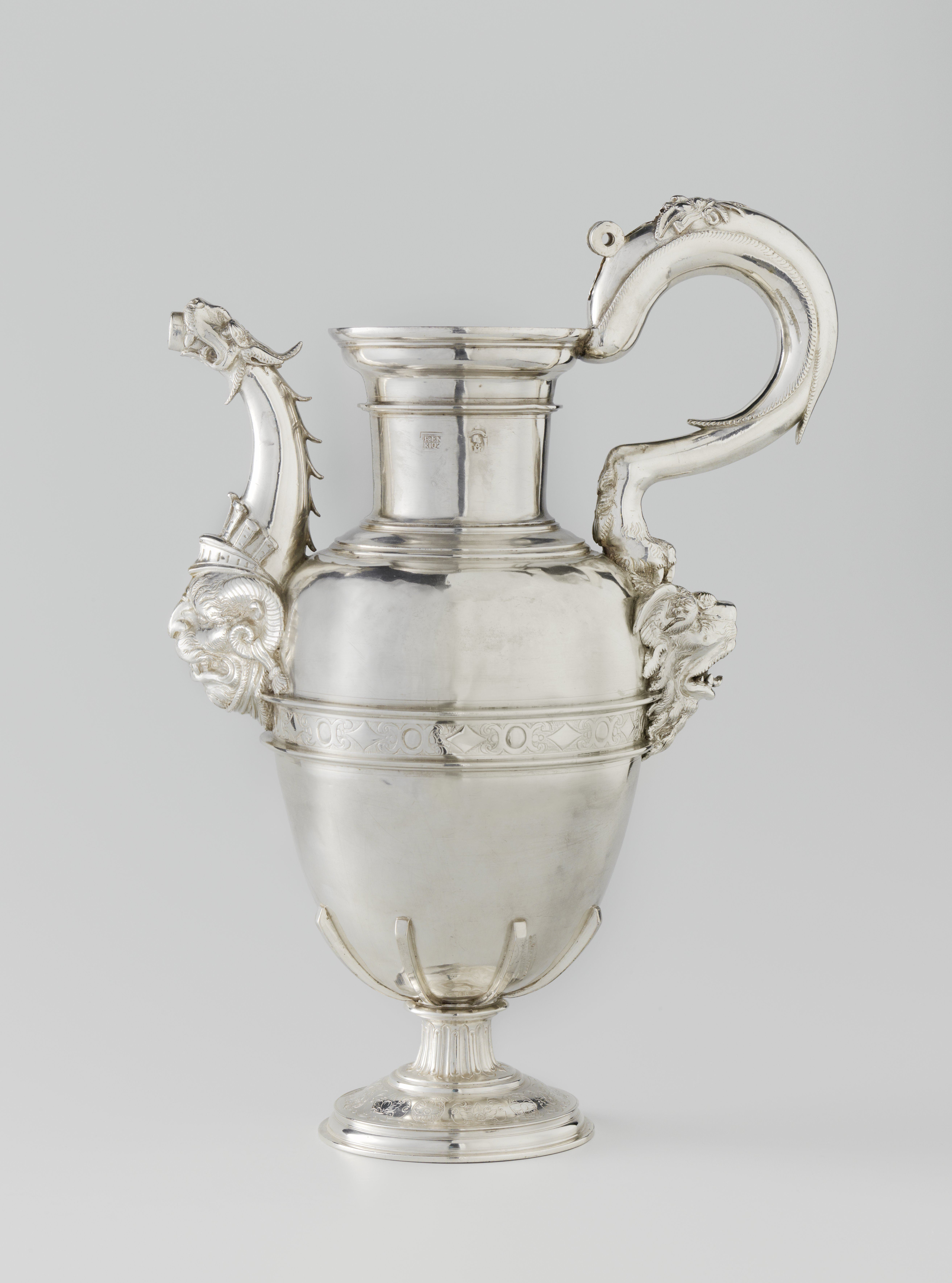 Schenkkan van zilver. Het eivormige, gladde vat, met gegraveerde band in het midden, wordt aan de onderzijde gegrepen door zes klampen en rust op een ronde voet. De tuit heeft de vorm van een draak. Gemerkt: F ENRIQZ. De zilveren schenkkan bevond zich in de lading van de Spaanse zilvervloot die Piet Heyn, in opdracht van de West-Indische Compagnie, in 1628 veroverde. ‘Deze kanne is gekomen uyt de Silvere Vloot verovert bij den Heer Luyt’ Admirael Pieter Pieters Heyn den 6 sept. 1618’, werd naderhand onder de voet gegraveerd. Het jaartal 1618 is een foutje: dat had 1628 moeten zijn. NG-NM-583